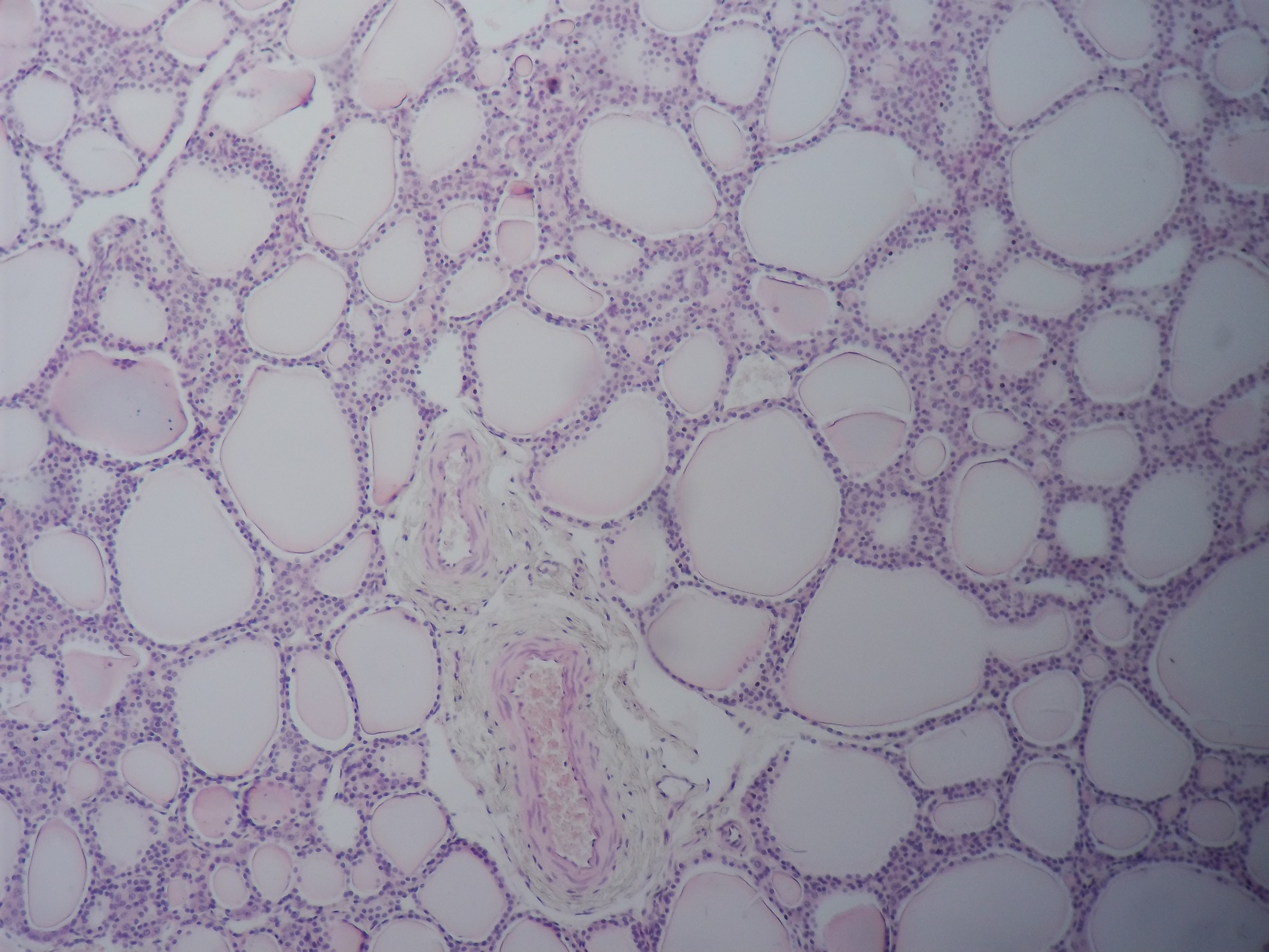 Tiroides, 400X; Hematoxilina-eosina. En el centro se ven vasos sanguineos